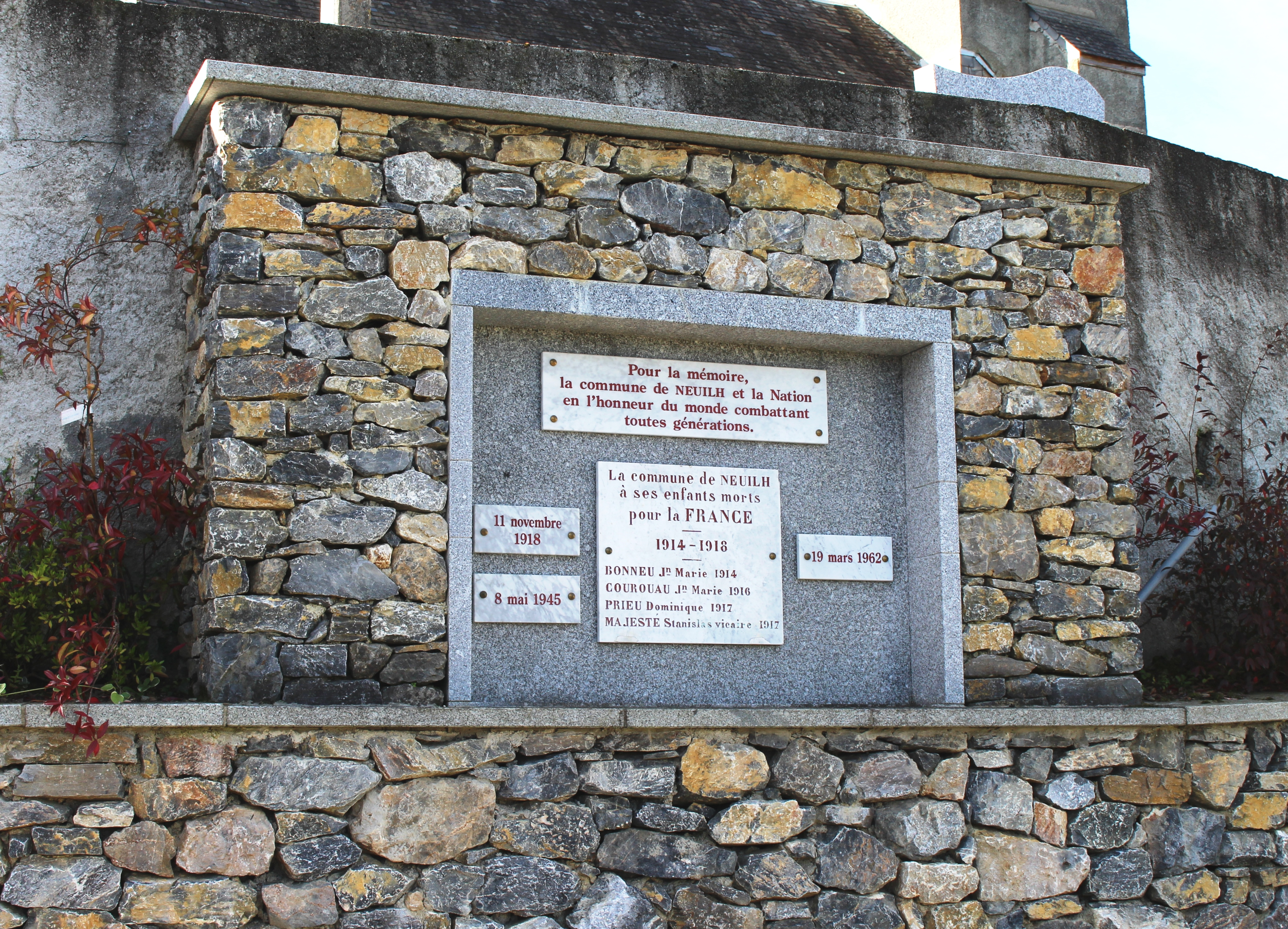 Monument aux morts de Neuilh (Hautes-Pyrénées)